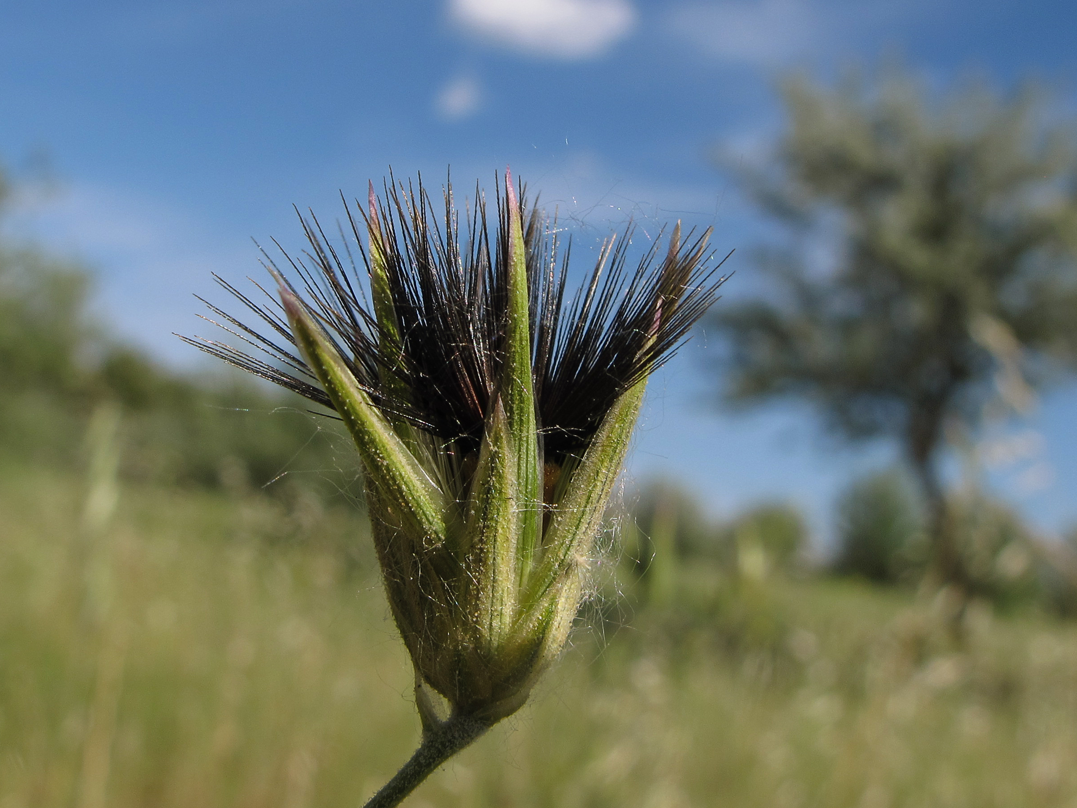 Las "cipselas" suelen presentar un penacho de finos pelos simples o plumosos denominado vilano o papus procedente de la transformación del cáliz. Los anglo-sajones- el término cipsela lo usan para los frutos de las Asteraceae en lugar de "aquenio"